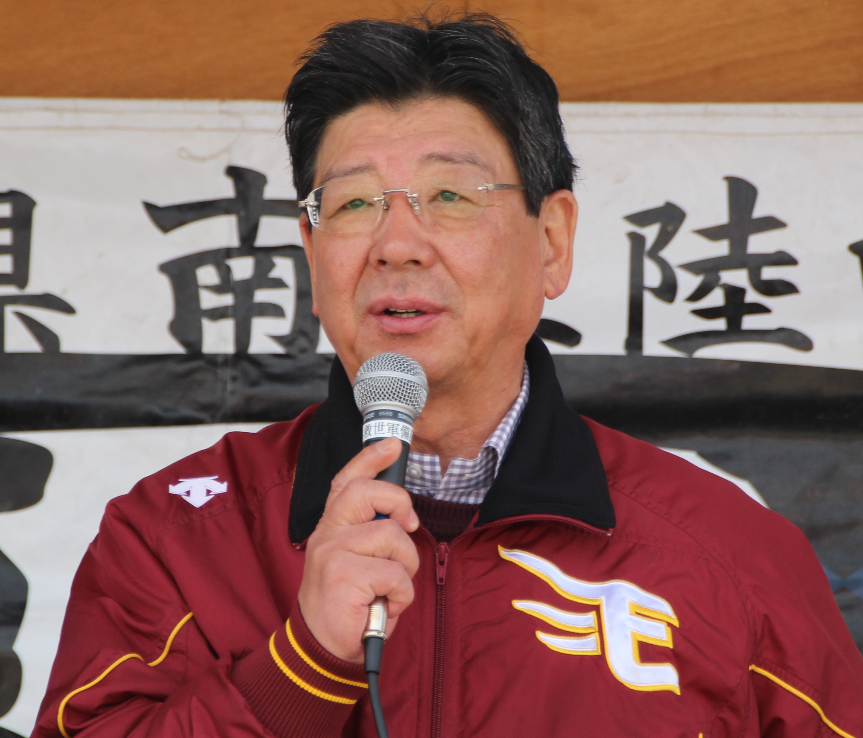 佐藤仁町長 2016年3月撮影